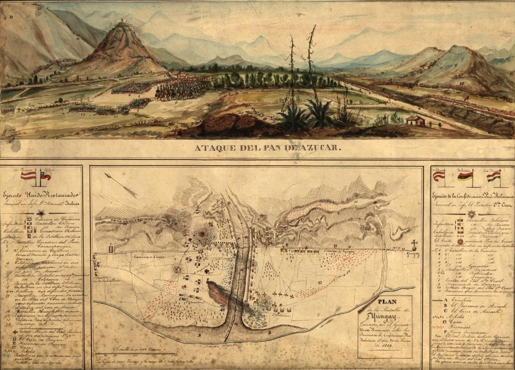 La toma del cerro Pan de Azúcar fue un episodio de la Batalla de Yungay librada el 20 de enero de 1839 en el marco de la guerra entre la Confederación Perú-Boliviana y Chile.